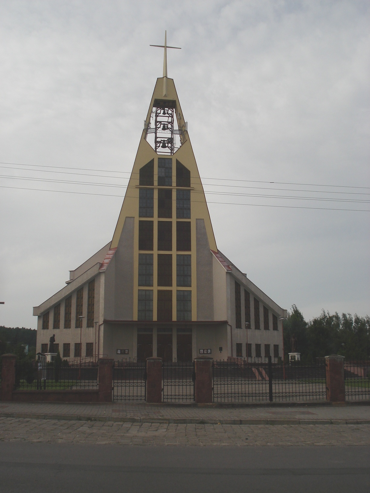 Kościół św. Brata Alberta w Skarżysku-Kamiennej